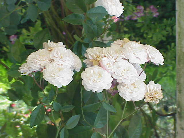 Species: Rosa sp. Family: Rosaceae Cultivar: Felicité ?erpe? Image No. 105